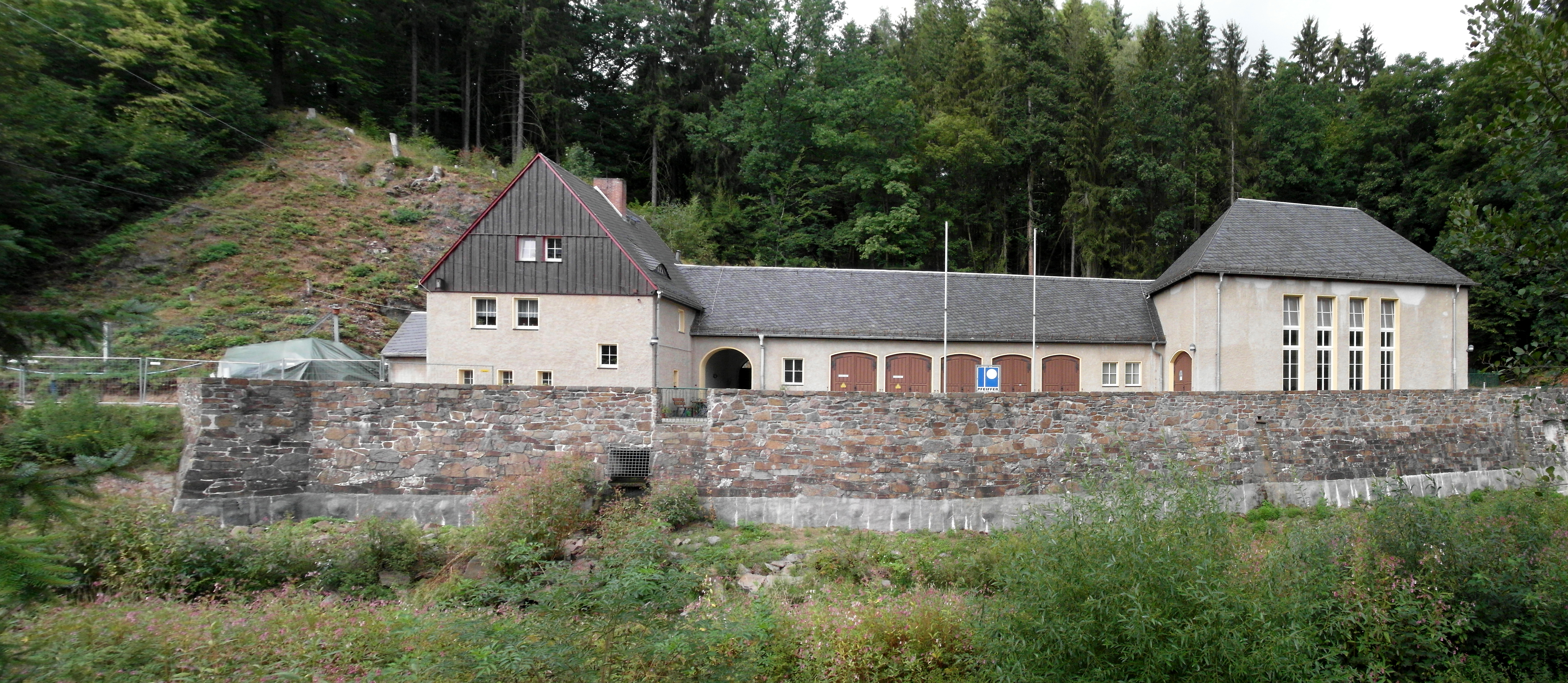 26.08.2018 01738 Dorfhain, Am Wasserkraftwerk 3 : Das Wasserkraftwerk Dorfhain wurde bis 1944 erbaut. Heute wird es von der DREWAG betrieben. Sicht von Südosten über die Wilde Weißeritz. . [SAM7082+7084.JPG]20180826200MDR.JPG(c)Blobelt